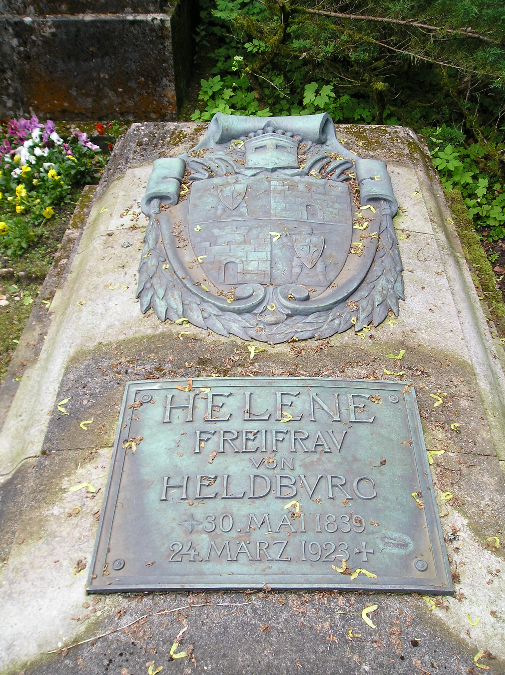 Grabstätte von Ellen Franz, der späteren Helene Freifrau von Heldburg in der gemeinsamen Grabanlage mit Herzog Georg II. von Sachsen-Meiningen auf dem Parkfriedhof in Meiningen.